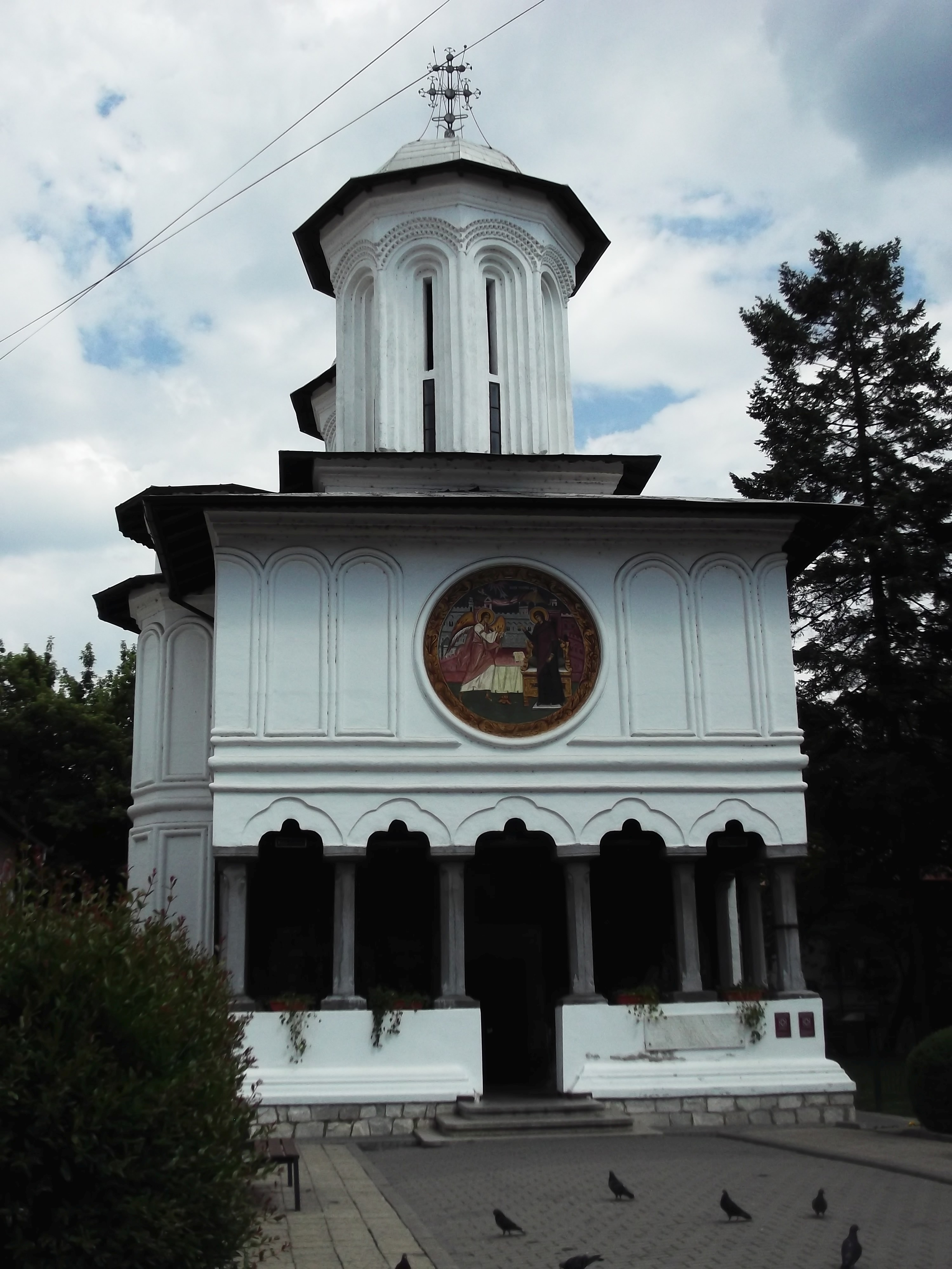 Biserica „Buna Vestire” din Râmnicu Vâlcea